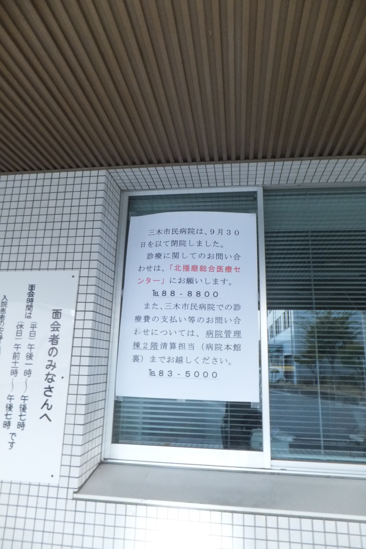 三木市民病院（2013年10月13日）